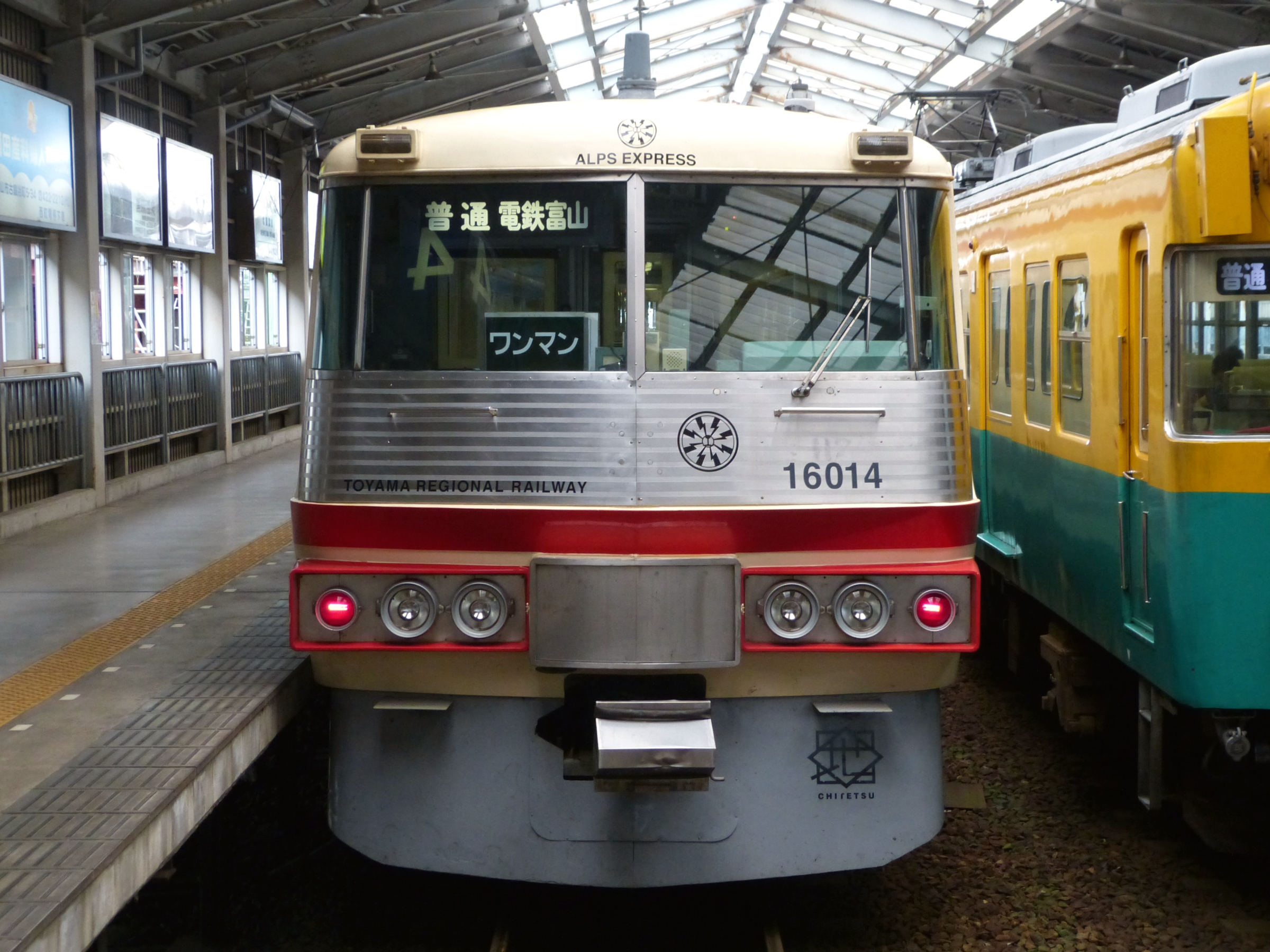 富山地方鉄道16010形正面。改造前の車号112がかすかに残る。